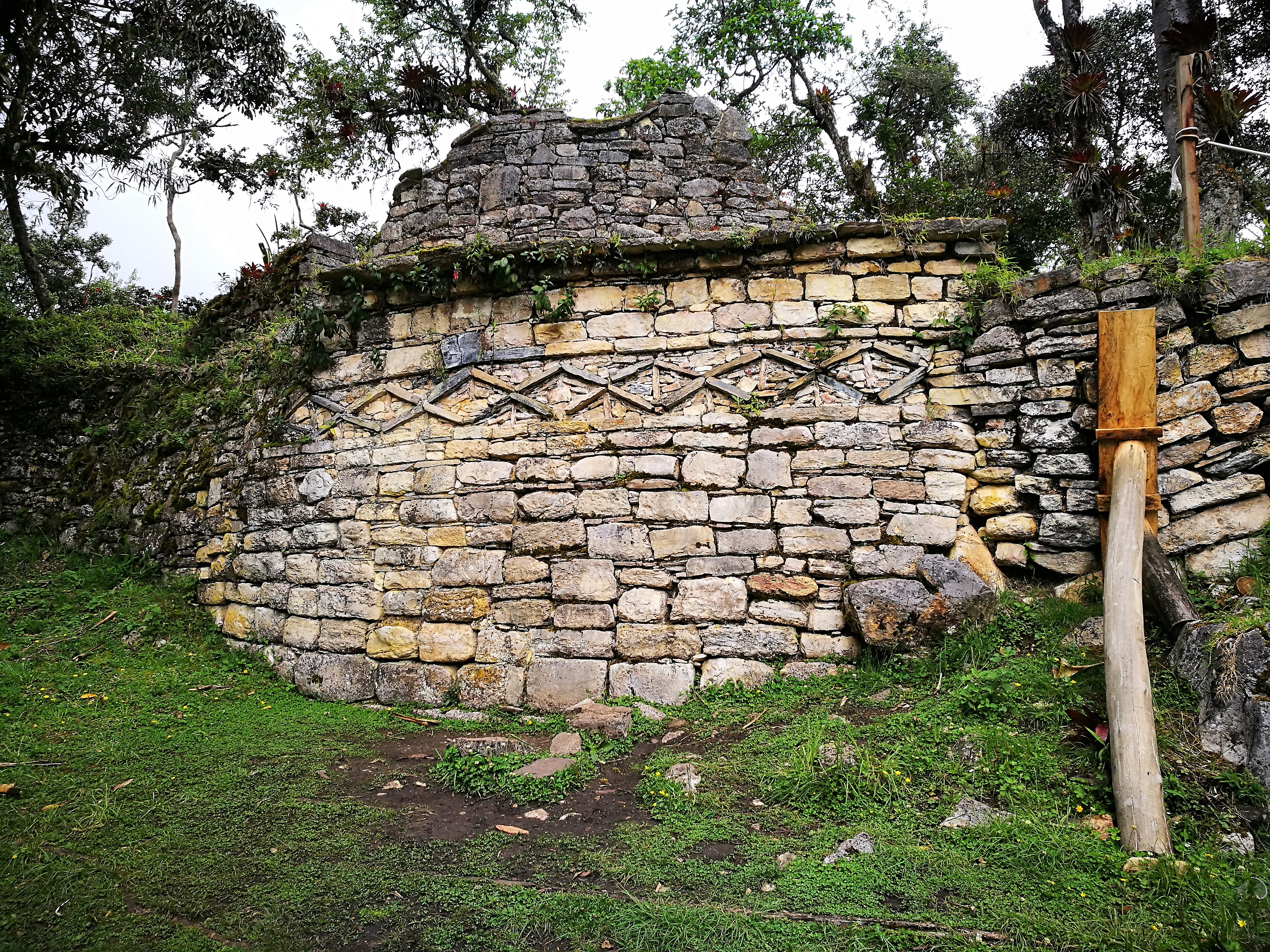 Muro d'una casa de Kuelap amb la decoració típica en forma romboidal de la cultura Chachapoyas